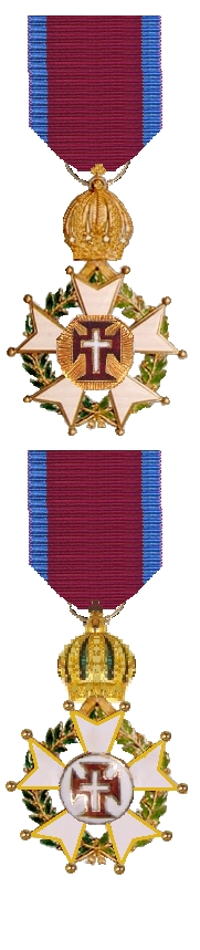 De Orde van van Christus was een in 1317 ingestelde Portugese ridderorde. Eigen tekening, GFDL en cc-by-sa-2.5 Robert Prummel